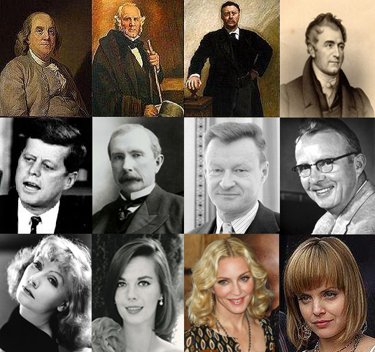 Montage